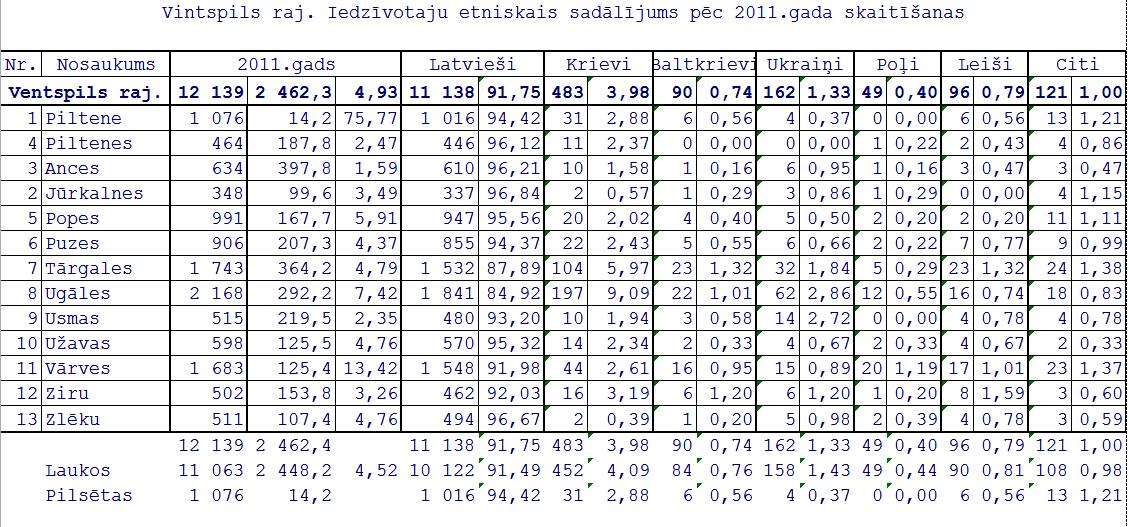 Latvijas 2011 gada tautas skaitīšanas dati